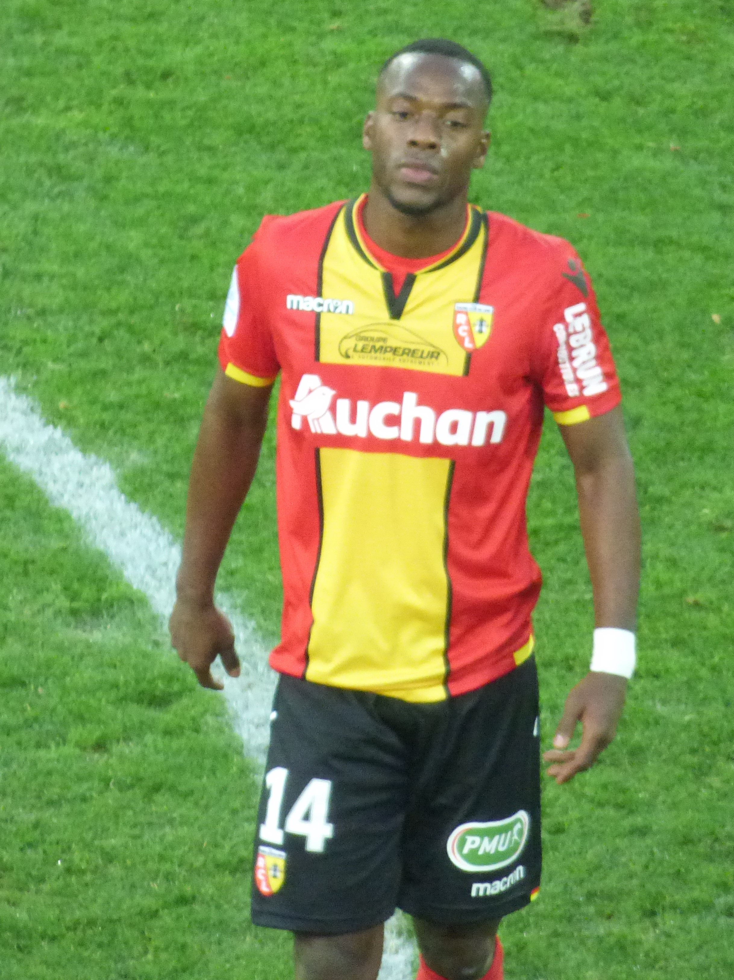 Yannick Gomis pendant le match RC Lens - AC Ajaccio, comptant pour la dix-neuvième journée du championnat de France de Ligue 2 2018-2019, le 22 décembre 2018, au Stade Bollaert-Delelis de Lens.